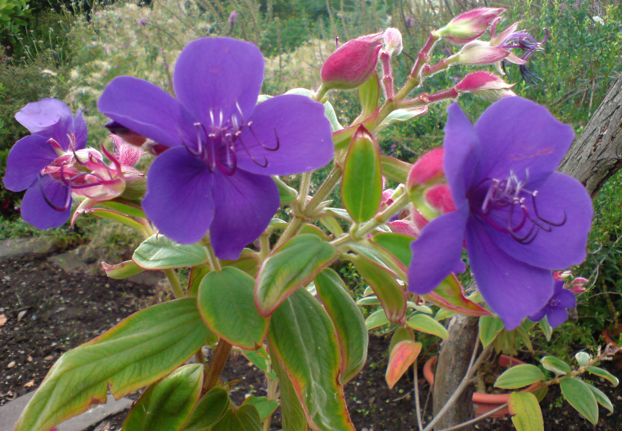 Tibouchina urvilleana (Glänzende Tibouchine, Prinzessinenblüte) - Botanischer Garten Leipzig